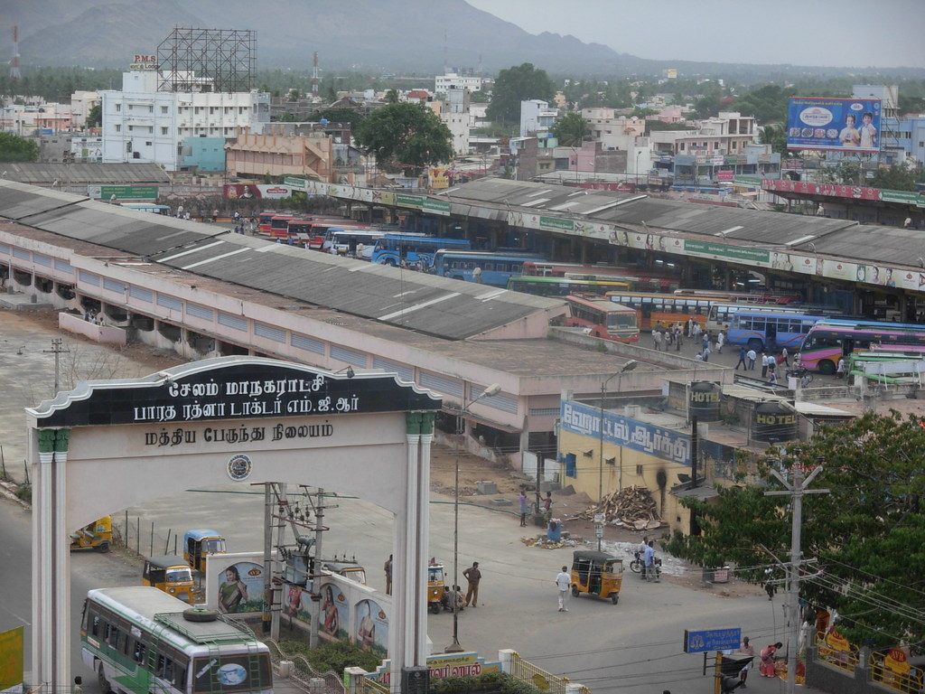 സേലം എംജിആർ ഇൻറഗ്രേറ്റഡ് ബസ് ടെർമിനസിൻറെ ദൃശ്യം